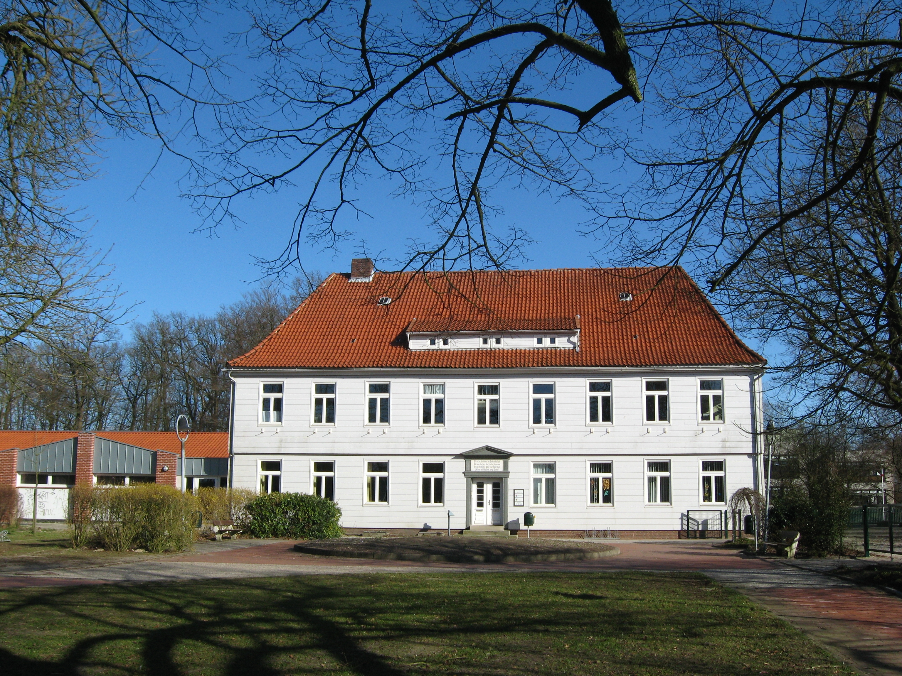 Forstamt in Hagen im Bremischen Datum: 28.03.2011 Urheber: M. Pfeiffer alias Benutzer:Gordito1869 Quelle: privates Fotoarchiv des Urhebers